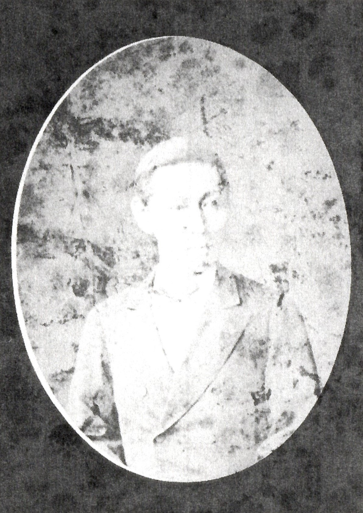 有馬道純の肖像写真。